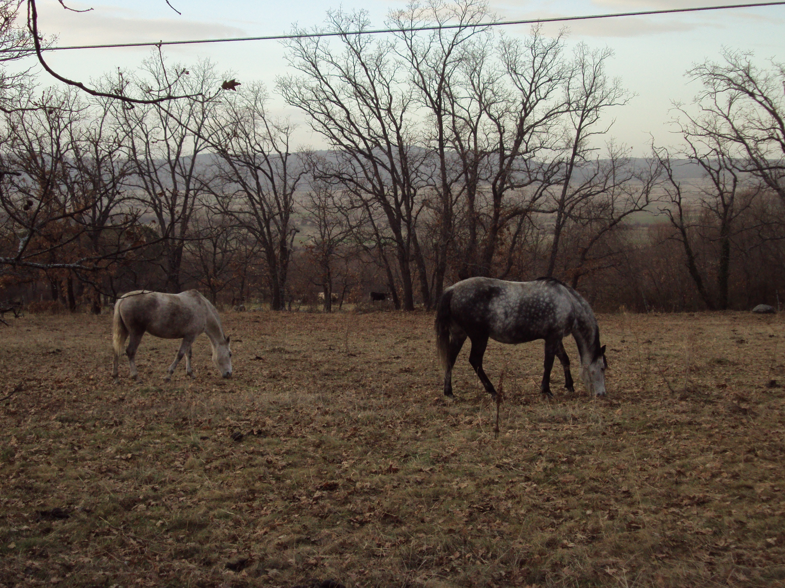 Caballos pastando en prados de Navaescurial (Sierra de Villafranca, Ávila, España)